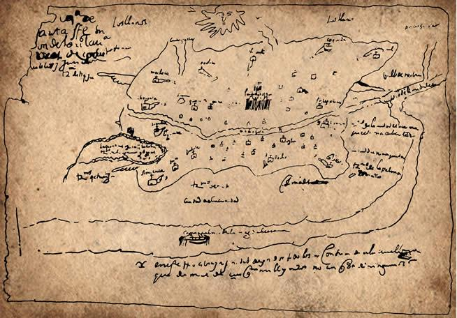 Primer plano de la provincia de Santafé, levantado por Diego de Torres, Cacique de Turmequé (1572).